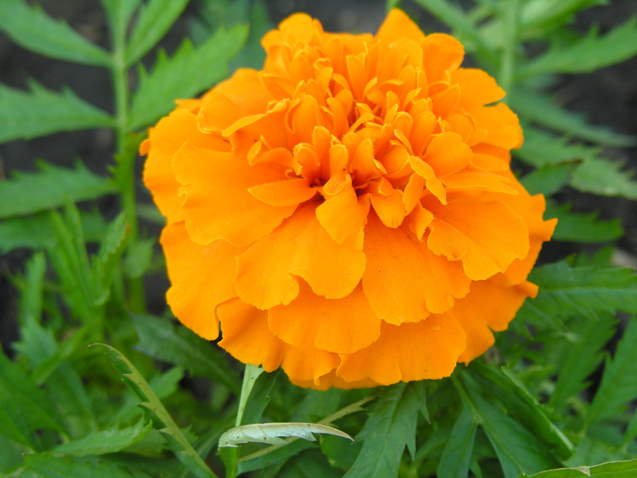 Didysis serentis (Tagetes erecta) Šeima. Astriniai (Asteraceae) Fotografavo: Algirdas, 2006 m. gegužės 3 d.